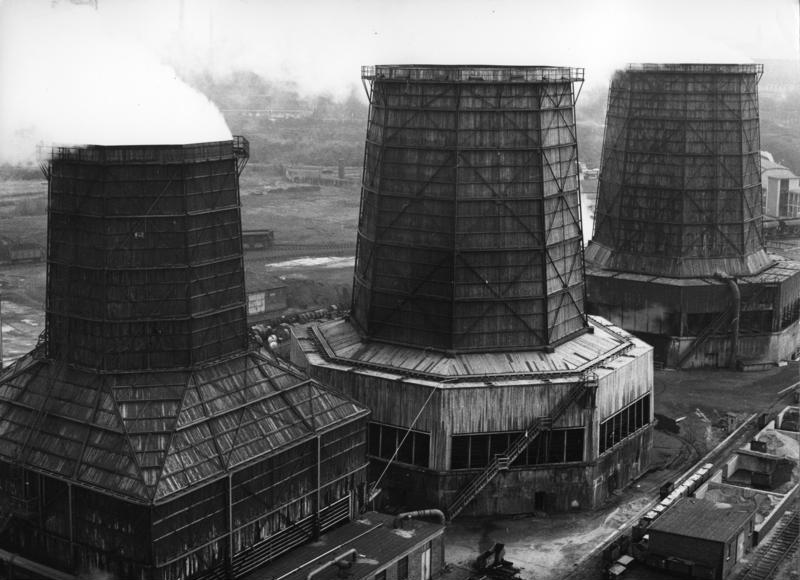 Ruhrbergbau-Essen Die Kühltürme von Sälzer-Amalie